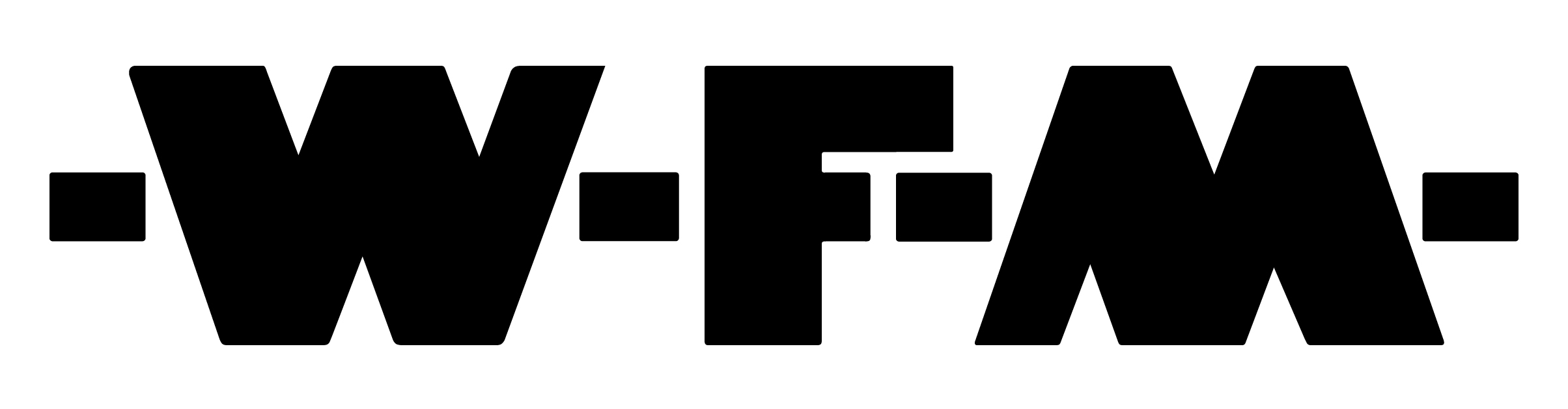 Rekonstrukcja logotypu Warszawskiej Fabryki Motocykli